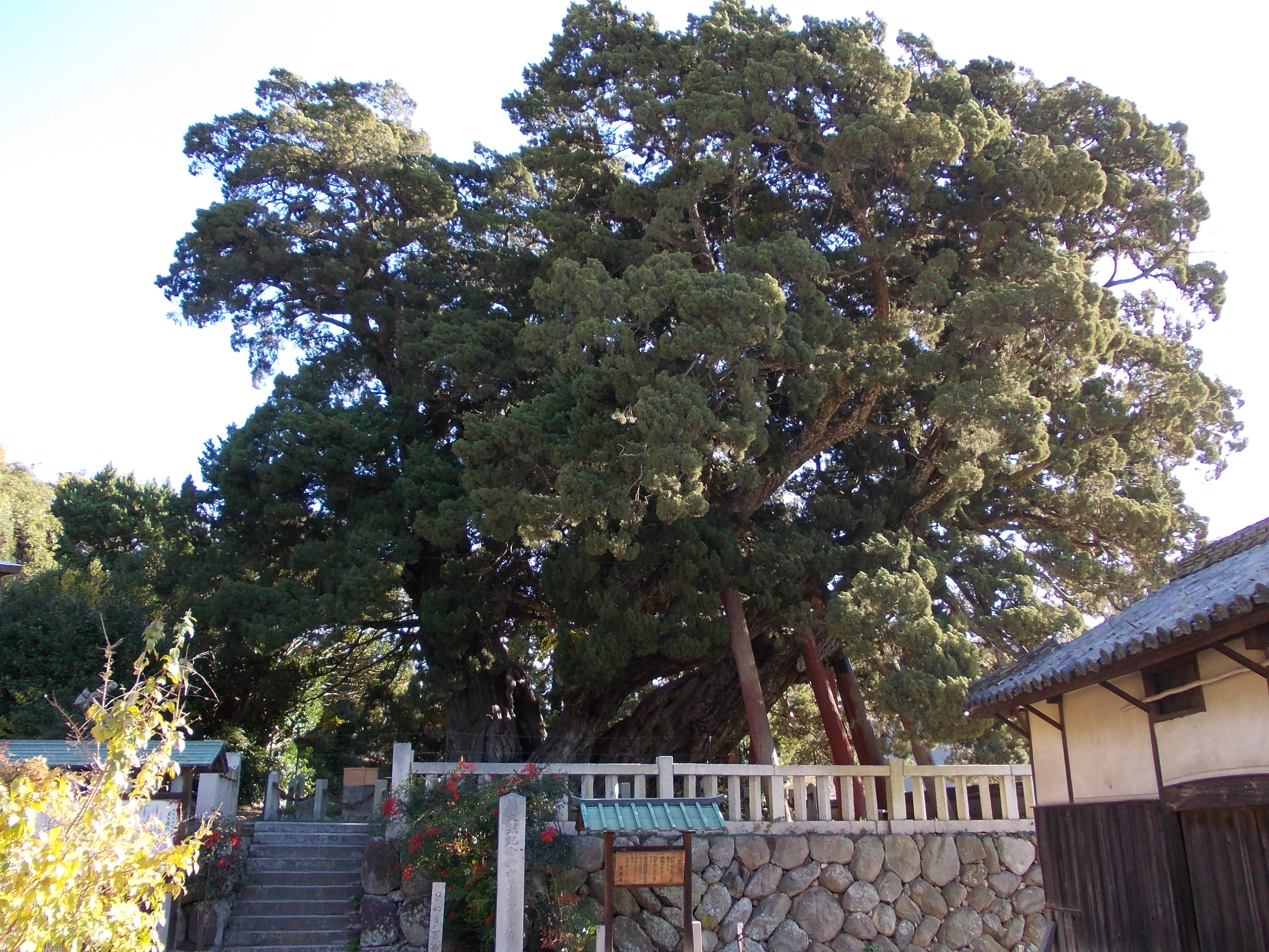 小豆島・宝生院のシンパク(特別天然記念物)